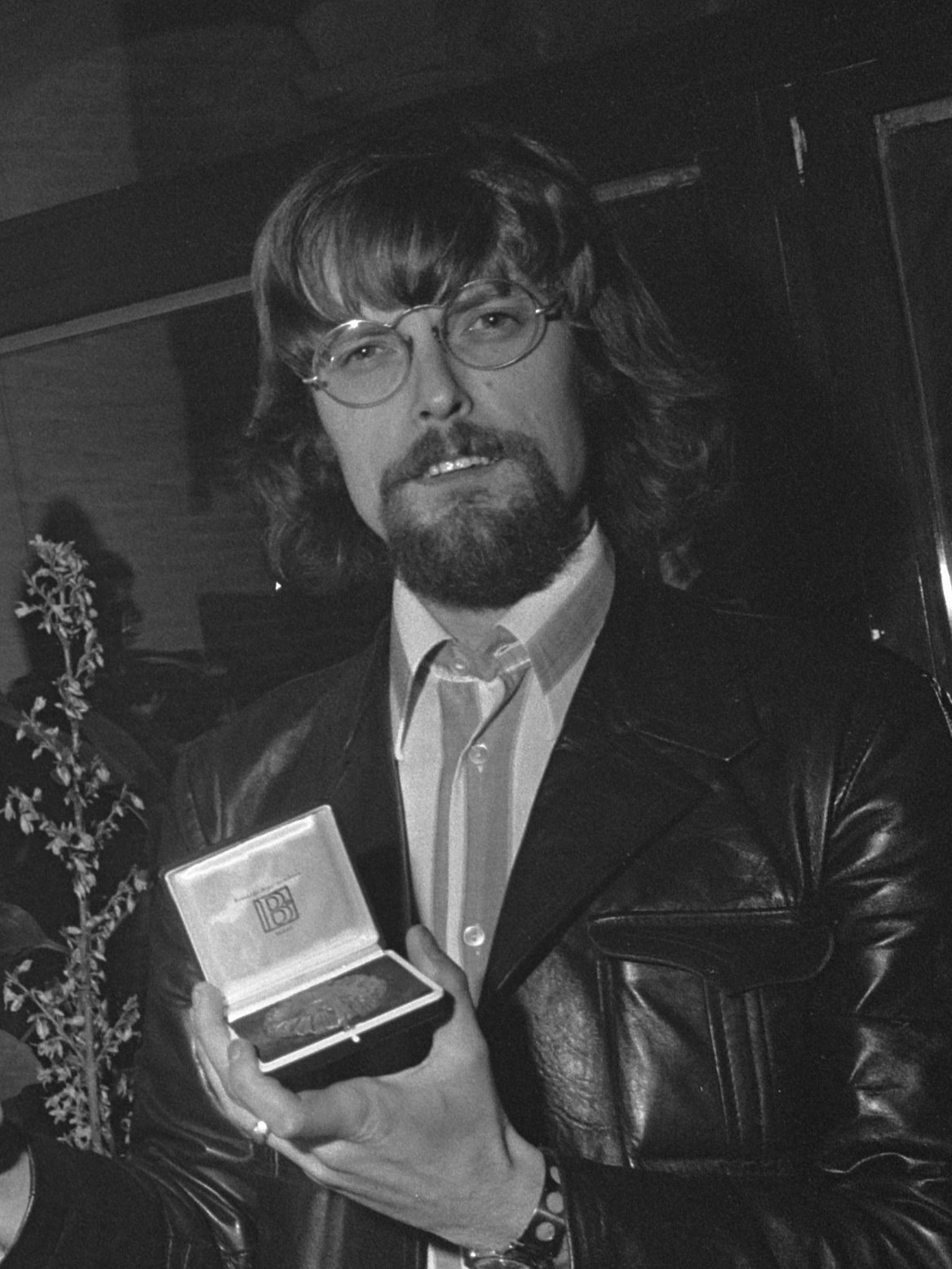 Burgemeester Samkalden verricht opening World Press Photo en reikt prijzen uit, Samkalden geeft prijs aan Vincent Mentzel.